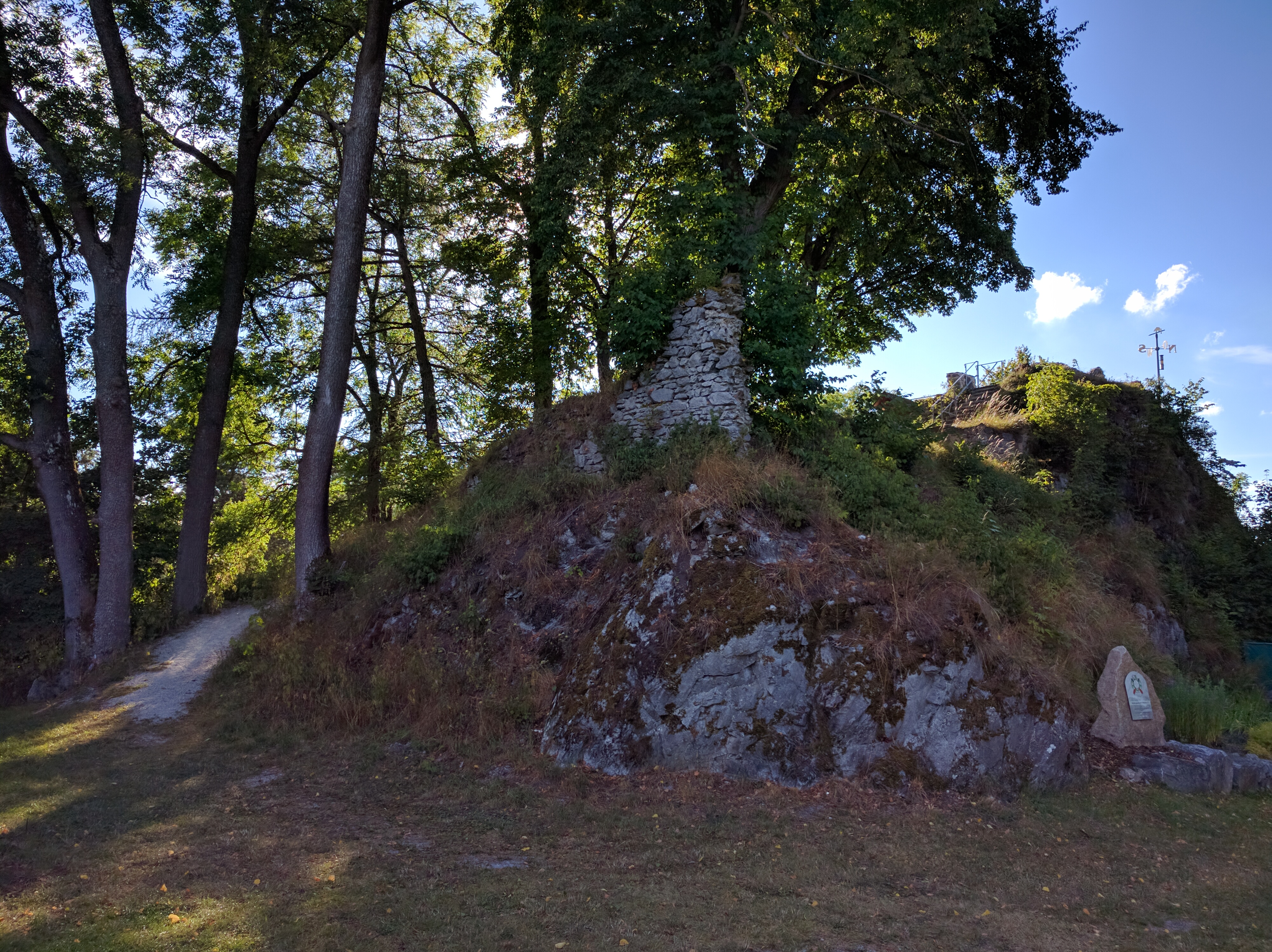 Mauerrest der Oberburg.